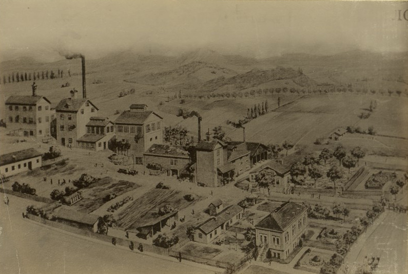 Парна пивоварна фабрика и фабрика за изкуствен лед на Б. Малотин & В. Хозман в Лом. Фотоалбум с фотографии на български индустриални предприятия от периода 1887-1912 г., подарен от Съюза на българските индустриалци на цар Фердинанд І по случай 25-годишнината от възшествието му на българския престол.